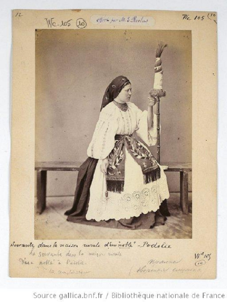 Podolia. Ukraine Вишиванка. Білий фартух з лиштвою. Широка спідниця. Шовковий вишитий пояс з тороками.